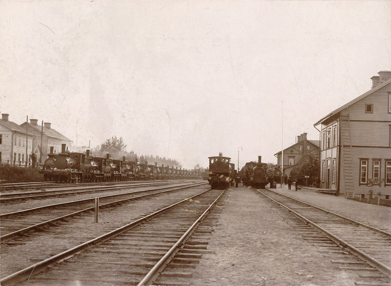 DIG92829 Långsele under fälttjänstgöringarna i Hälsingland i september 1904. The railway station in Långsele, Sweden in September 1904. Photo: Carlstein, 1904.